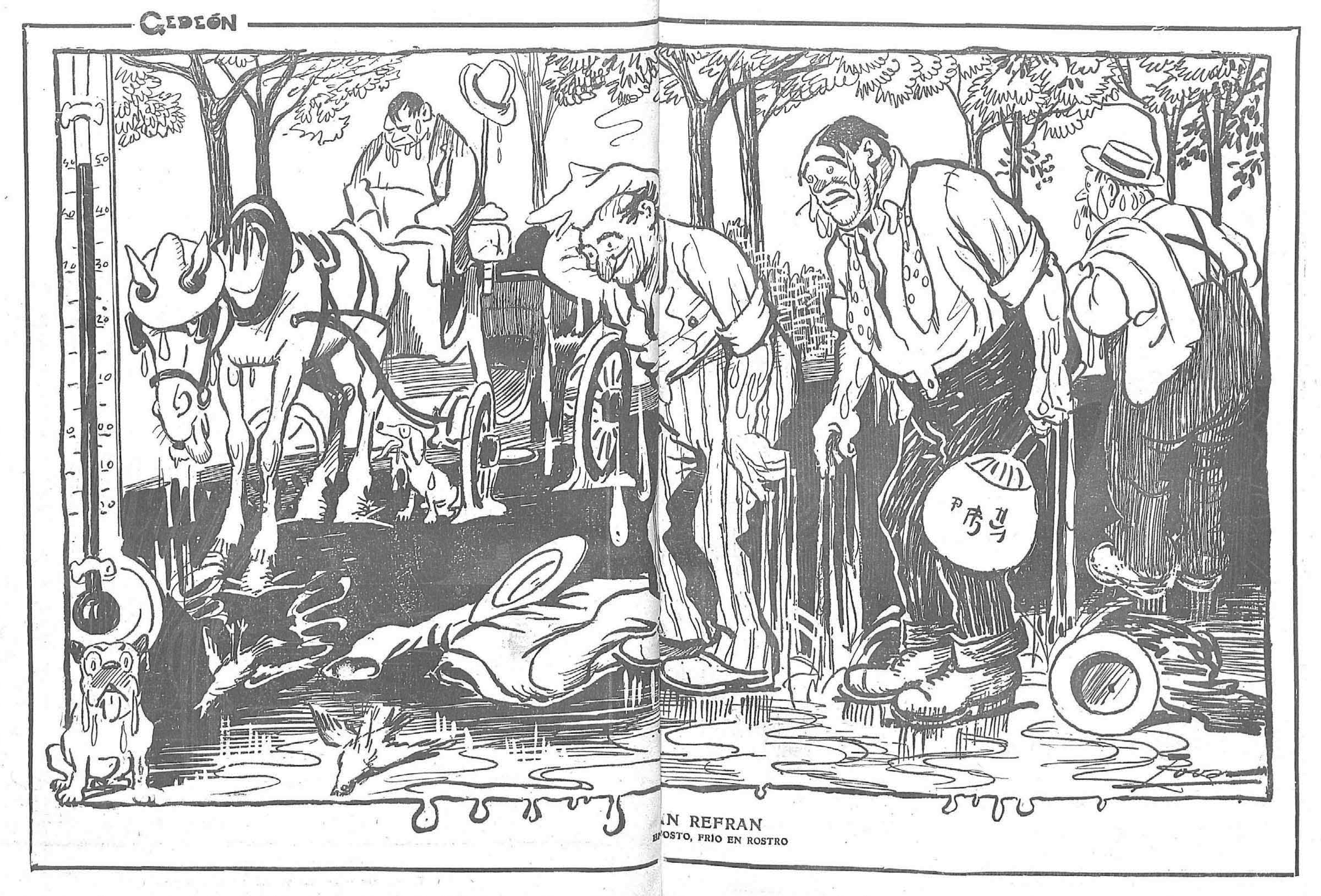 Un refrán. En agosto, frío en rostro.